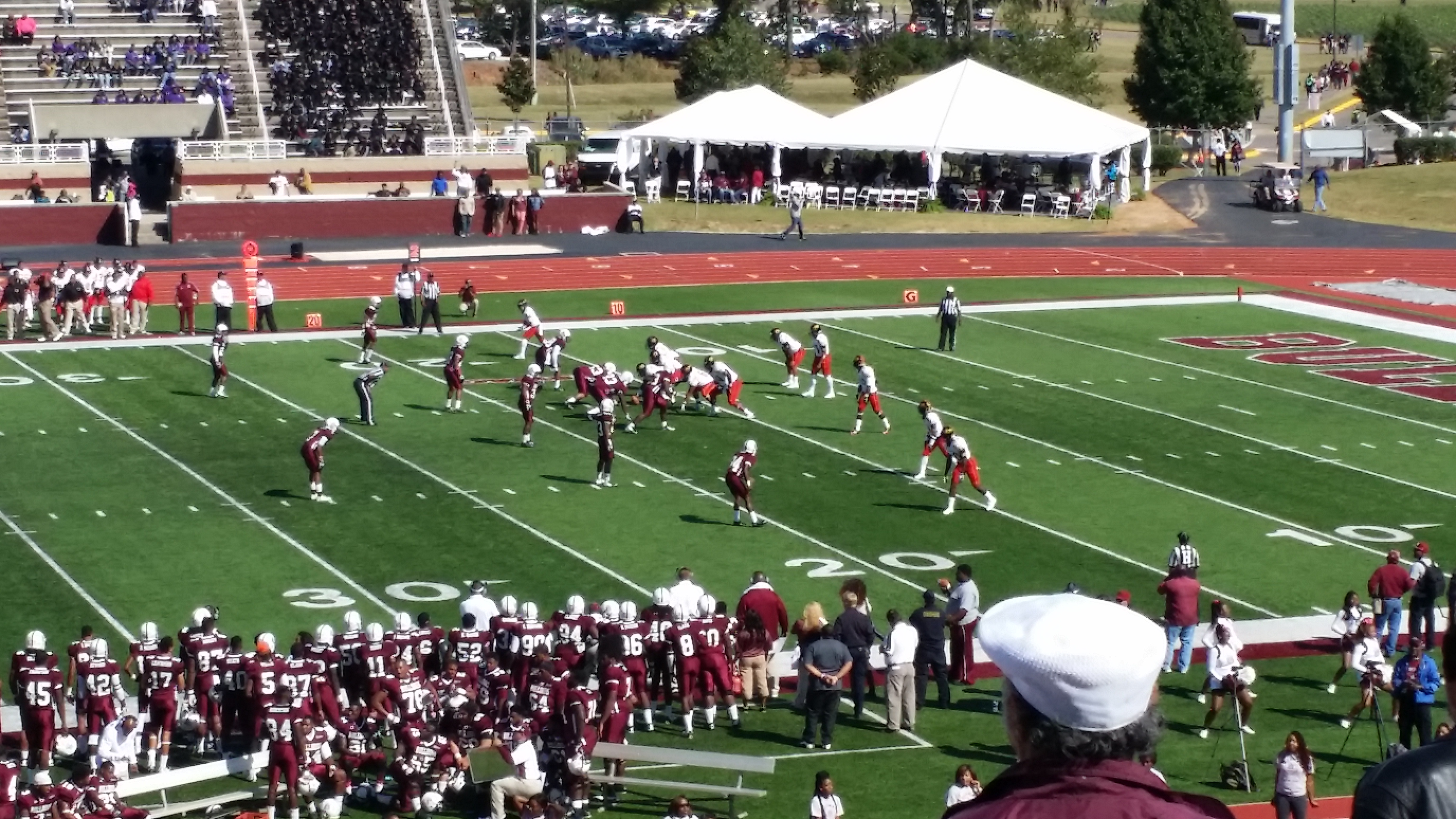 Alabama A&M vs. Grambling, 2014